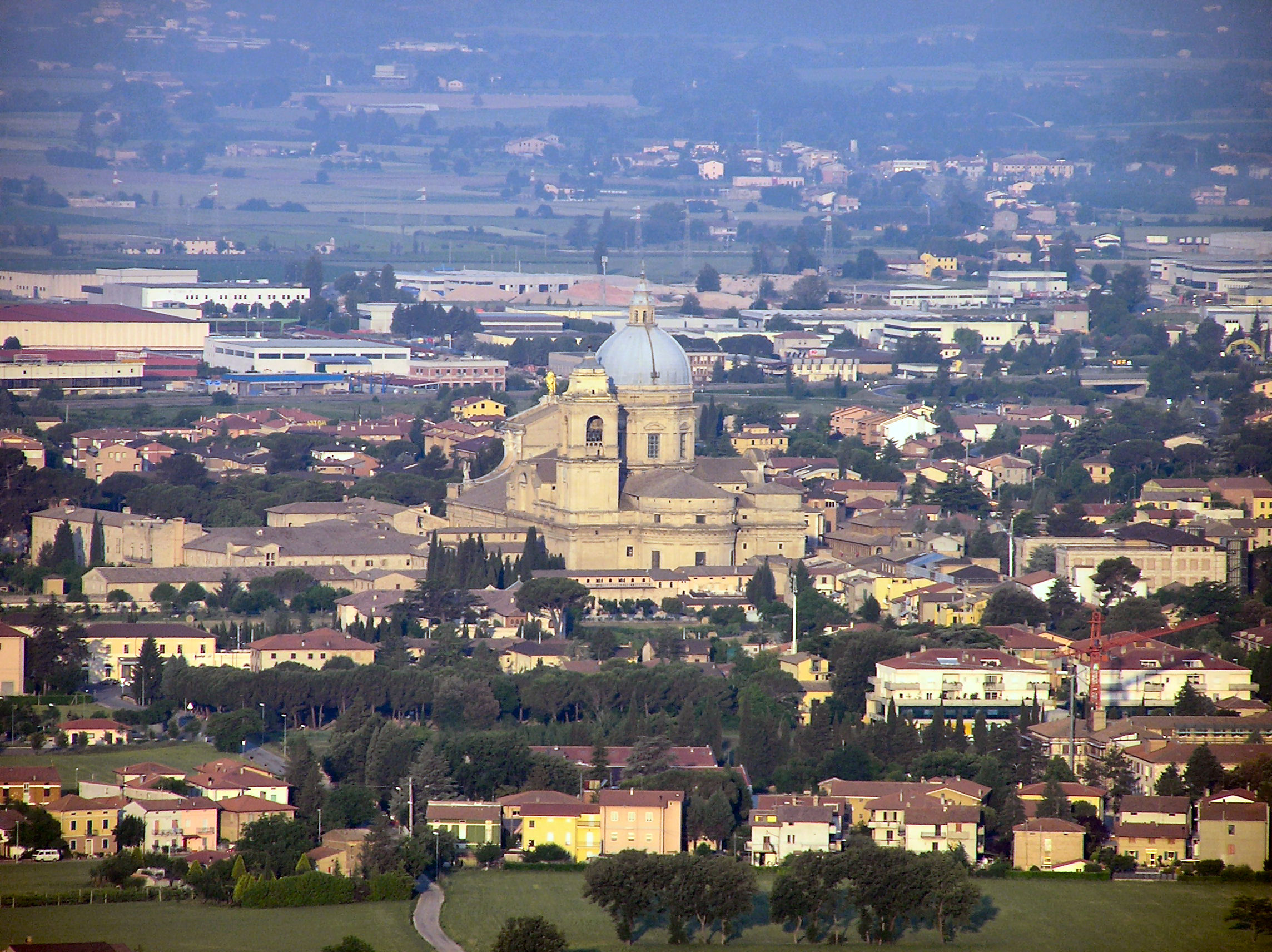 Assisi, Santa Maria degli Angeli with Basilica